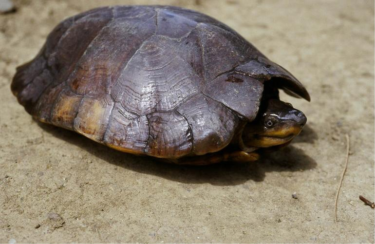 Heosemys leytensis